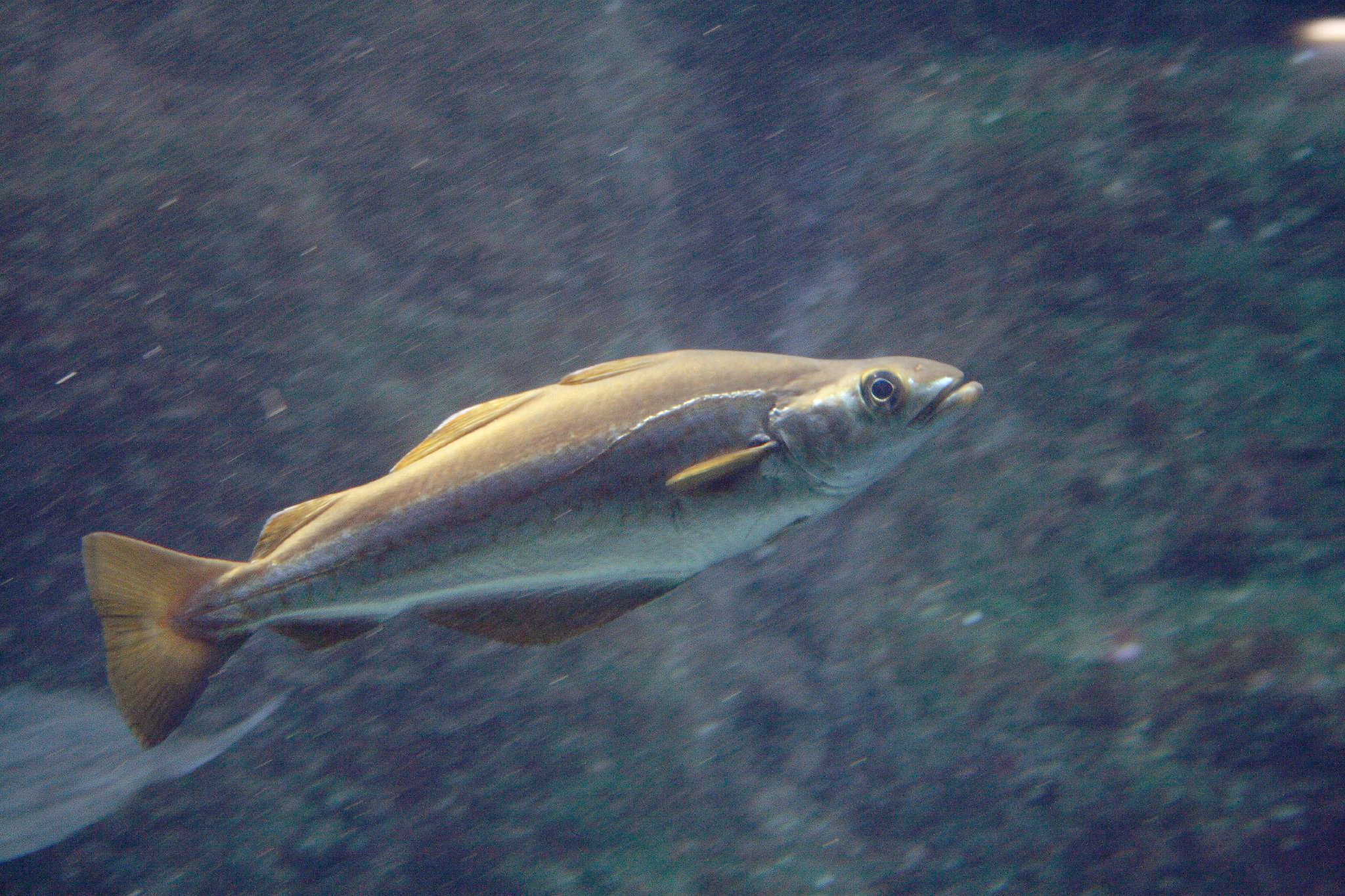 Pollachius pollachius Abadejo en el acuario de Coruña(ABADEJO - POLLACHIUS POLLACHIUS )